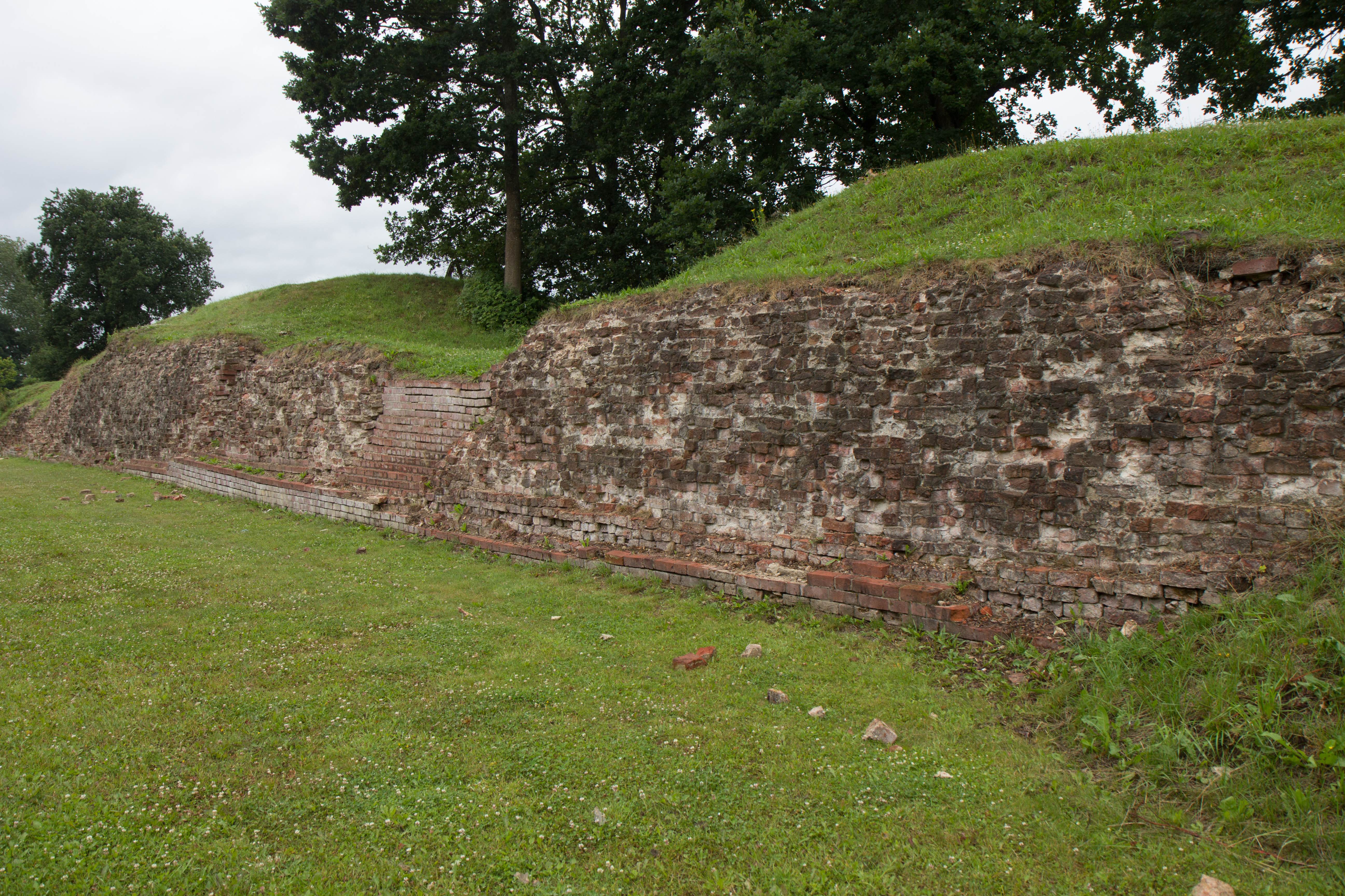 Danewerk